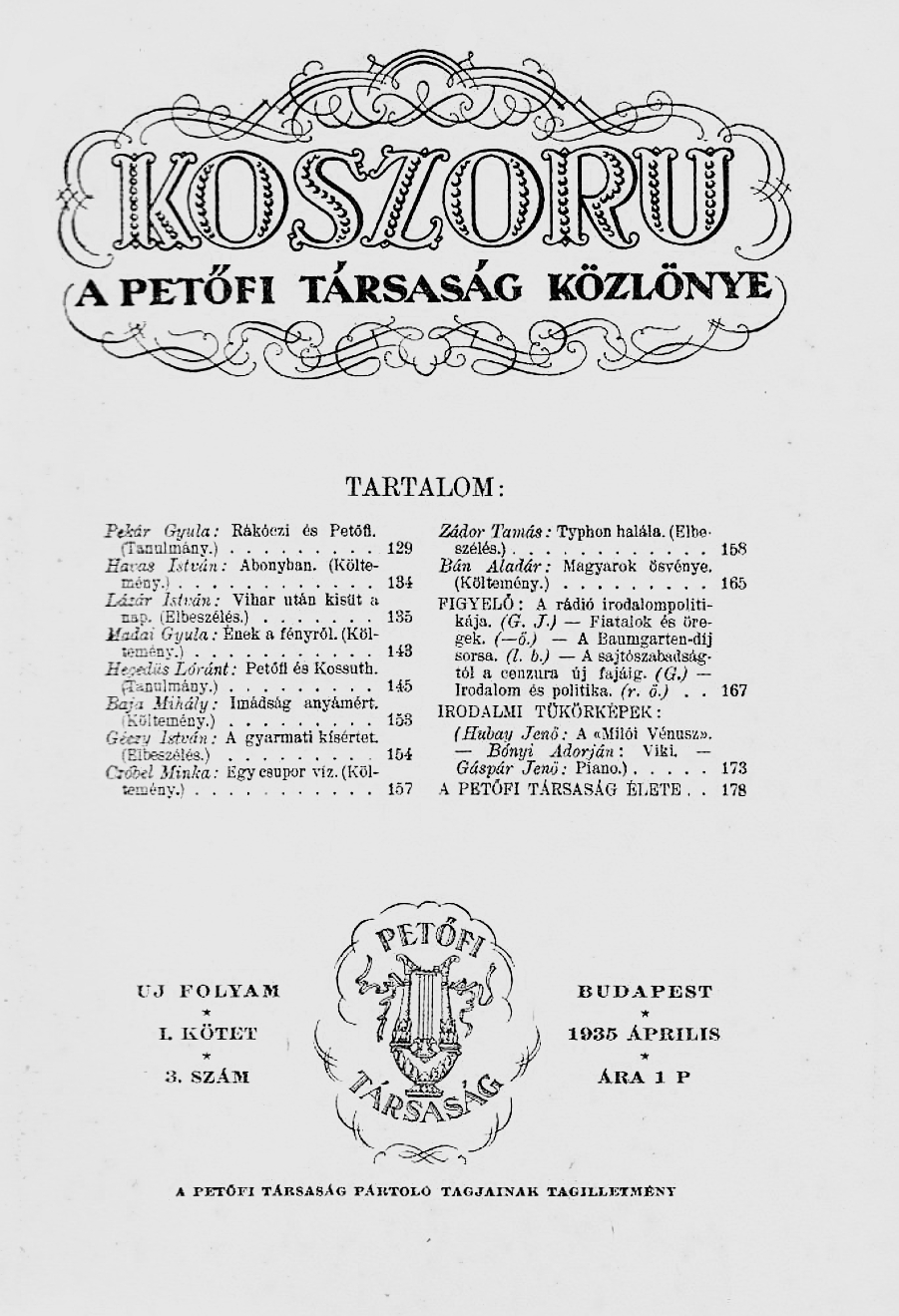 A Koszoru 1933 április havi címlapja - a Petőfi Társaság havi közlönye volt. A Petőfi Társaság (1876–1944) a Petőfi-kultusz terjesztése és a magyar szépirodalom nemzeti szellemben való művelése céljából alapított egyesület volt.